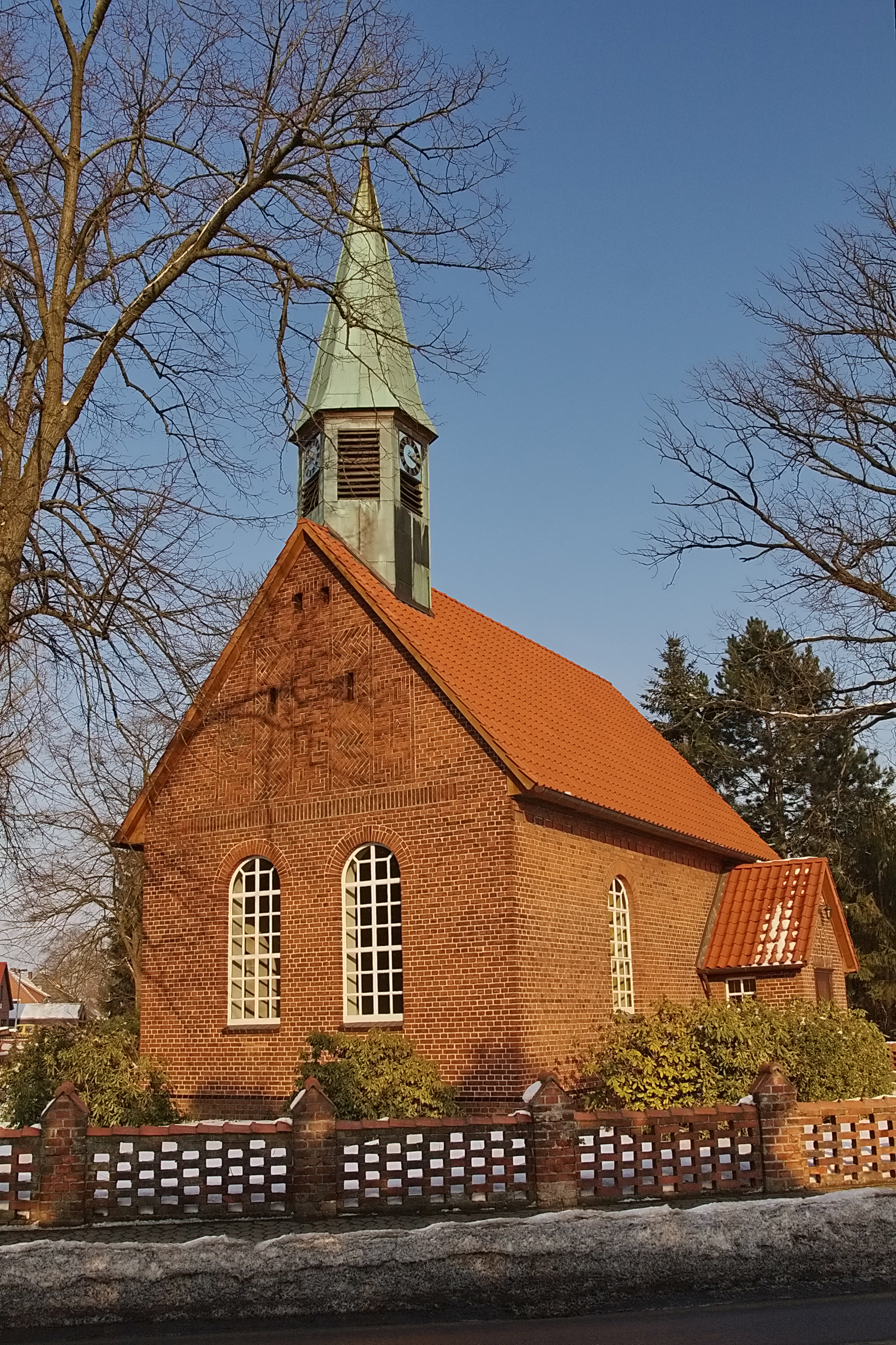 Johanniskapelle in Abbensen (Wedemark), Niedersachsen, Deutschland